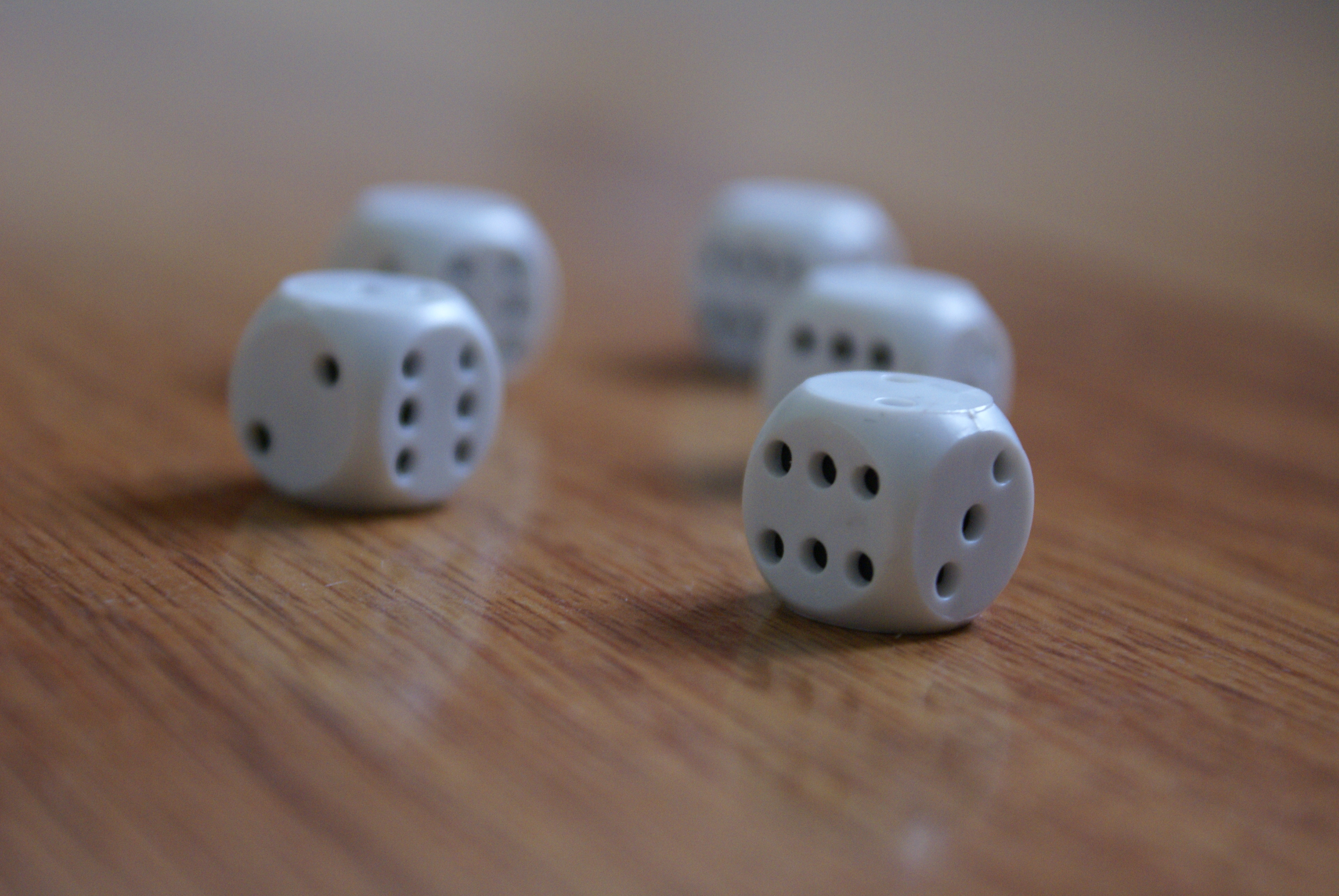 Kości do gry.